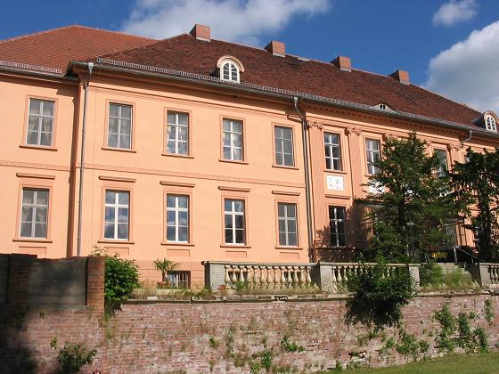 Quitzow-Schloss in Rühstädt, Prignitz, Brandenburg